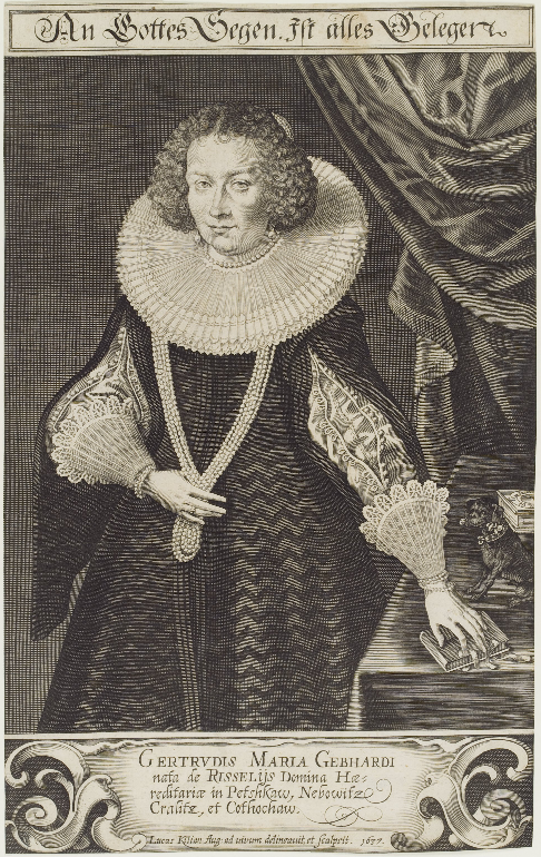 Depicted person: Gertrud Maria von Gebhard (1592–1624), nee von Ryssel